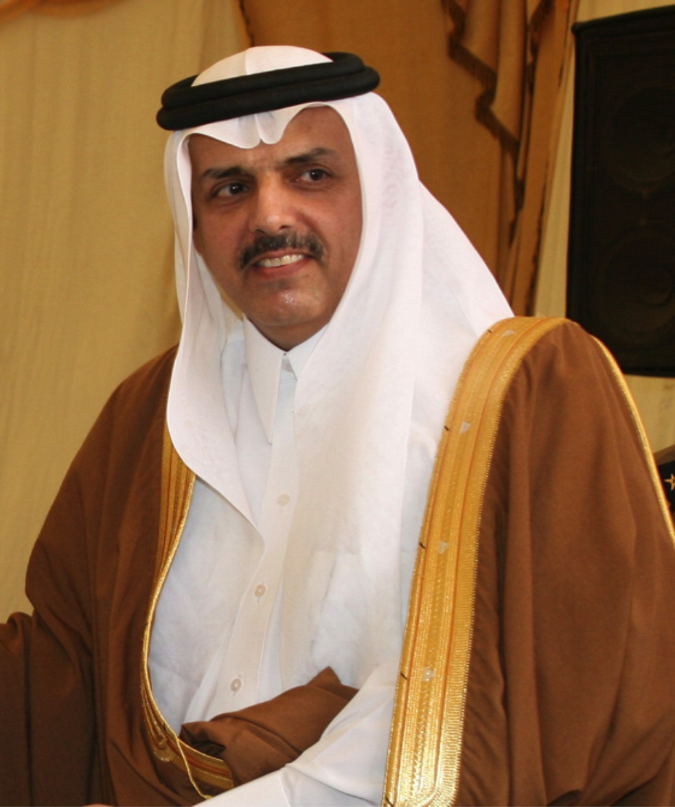 صورة شخصية